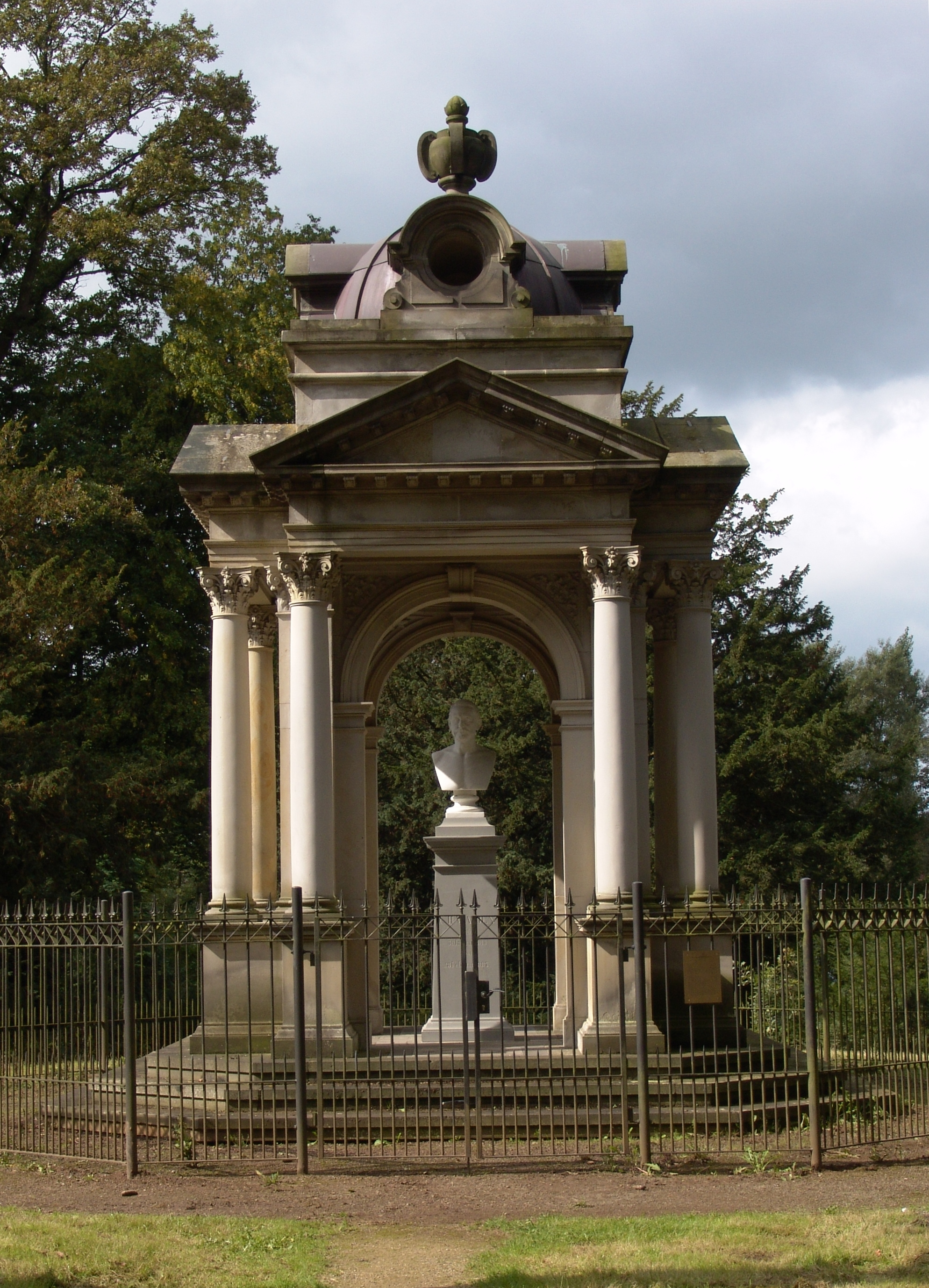 Wätjens Landgut, Gedächtnistempel in Bremen, Landrat-Christians-Straße.Das abgebildete Objekt ist ein geschütztes Kulturdenkmal in der Freien Hansestadt Bremen, mit der Nr. 1767 beim Landesamt für Denkmalpflege registriert.